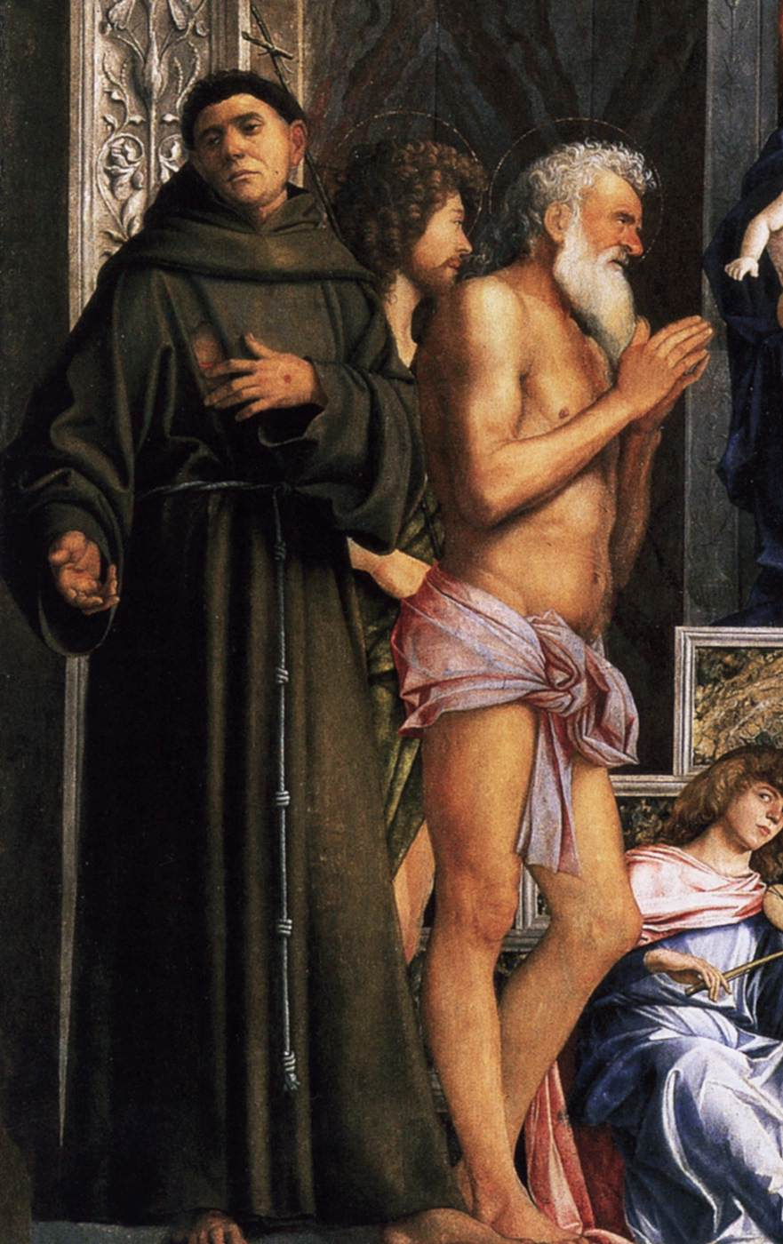 Gallerie dell'Accademia - MIBAC Pala di San Giobbe by Giovanni Bellini This is a photo of a monument which is part of cultural heritage of Italy.